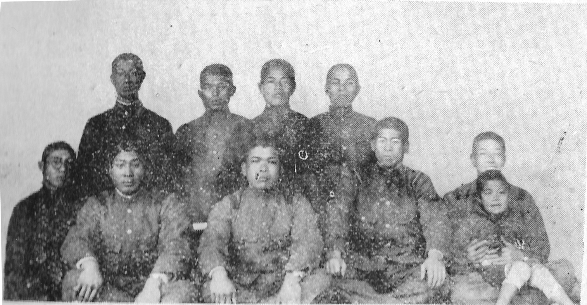 陸士合格直後の西住(前列左)。先輩、友人たちとともに。前列中央は赤星繁、右は甲斐勝衛、西田義晴。後列は不明。